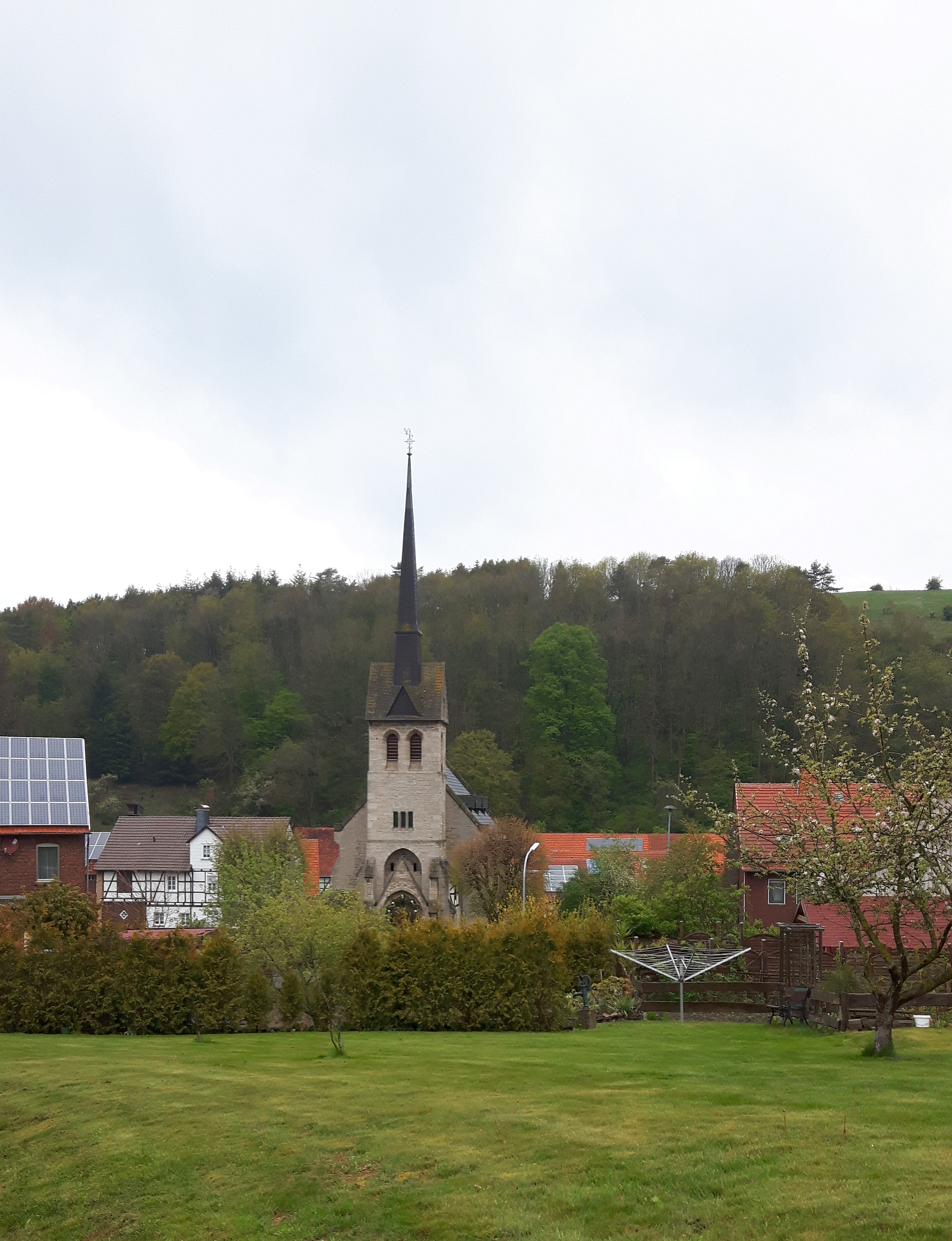 Wirmighausen, Gemeinde Diemelsee (Germany)